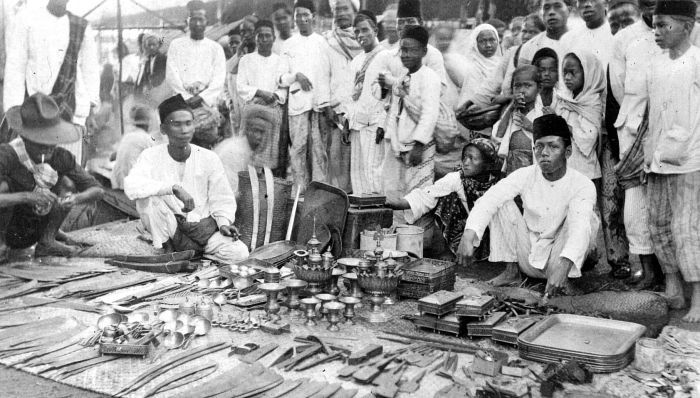 Repronegatief. Uitstalling van Nagara-smeedwerk op de markt te Rantau, Kalimantan